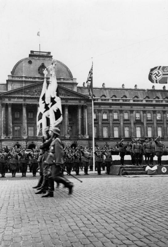 Vor dem königlichen Schloß in Brüssel. Parade vor dem Führer einer Armee. Pro.Kp. 612